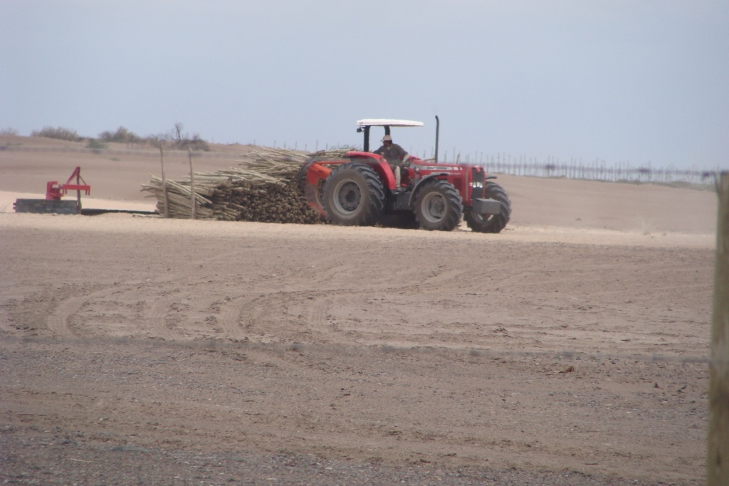 Laboreo a tracción mecánica en la Finca La Campana en el departamento 25 de Mayo, provincia de San Juan, Argentina